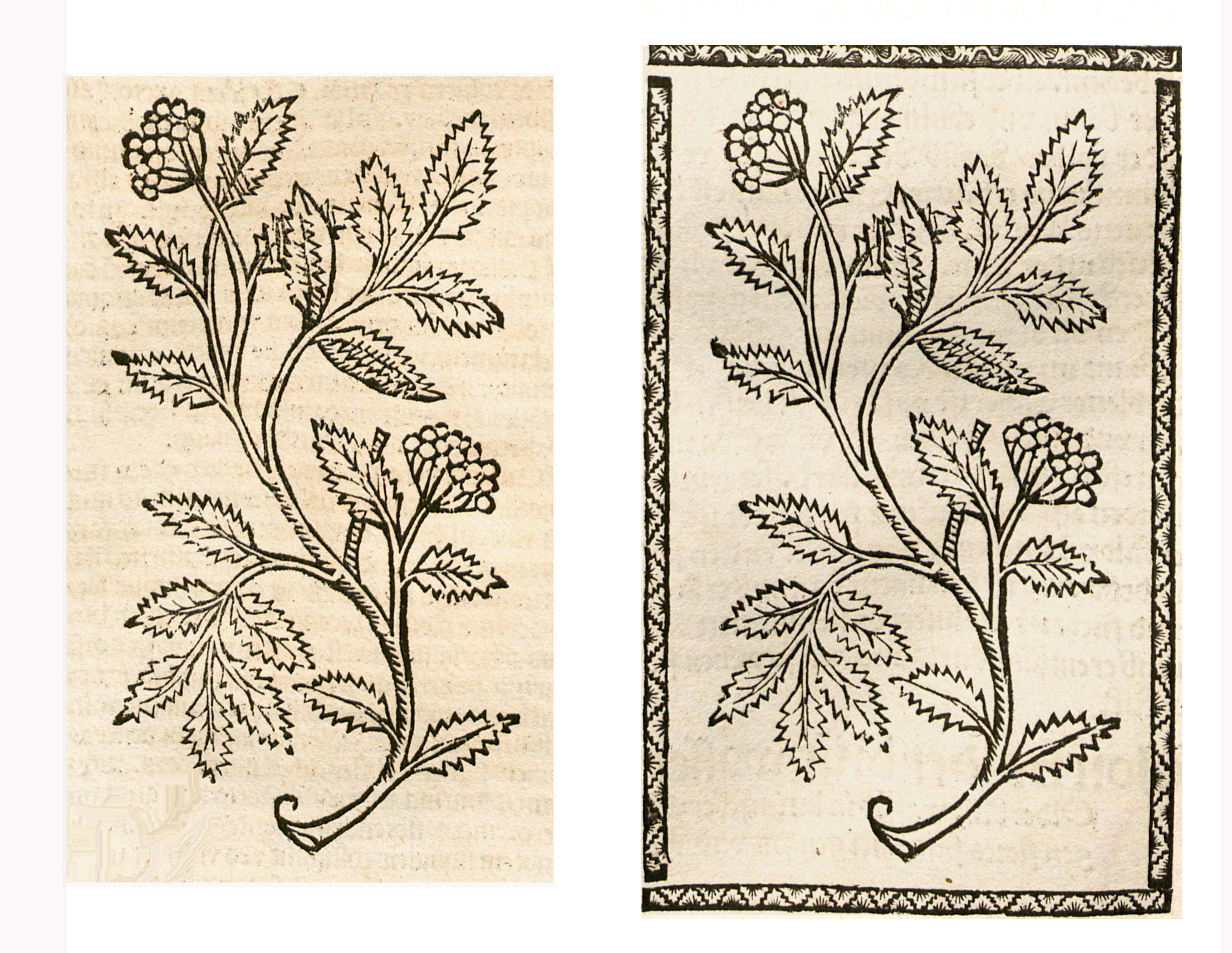 Abbildung von: Holder Rinde (Sambucus niger)